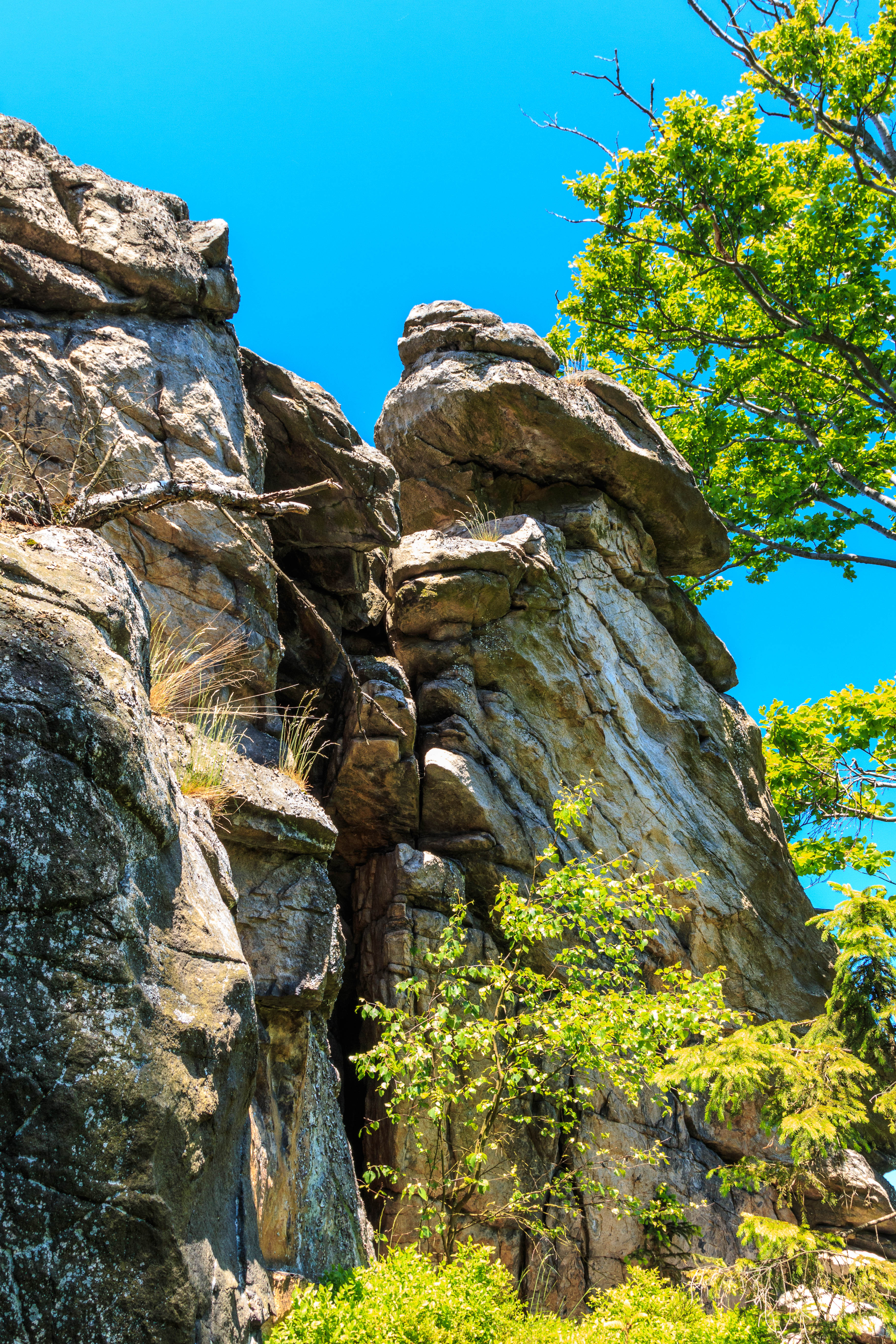 PP Malinská skála Project: Chráněná území.